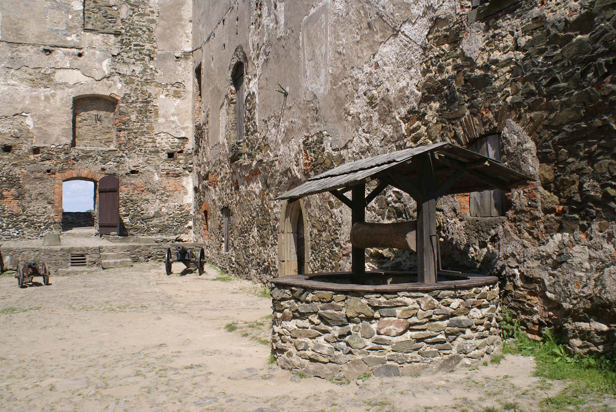 Bolków, ośrodek historyczny miasta